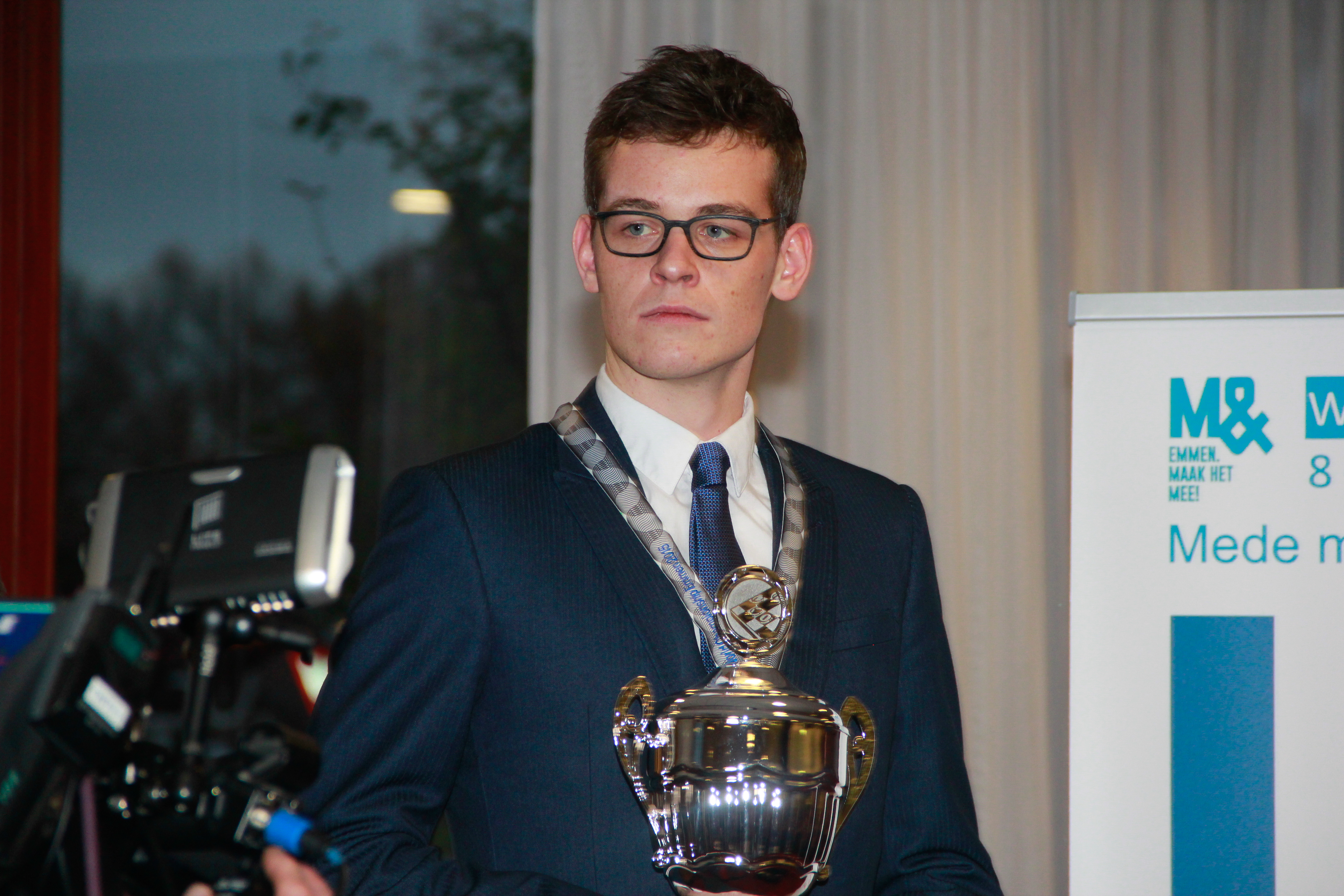 Draughts player Roel Boomstra during the 2015 World Draughts Championship